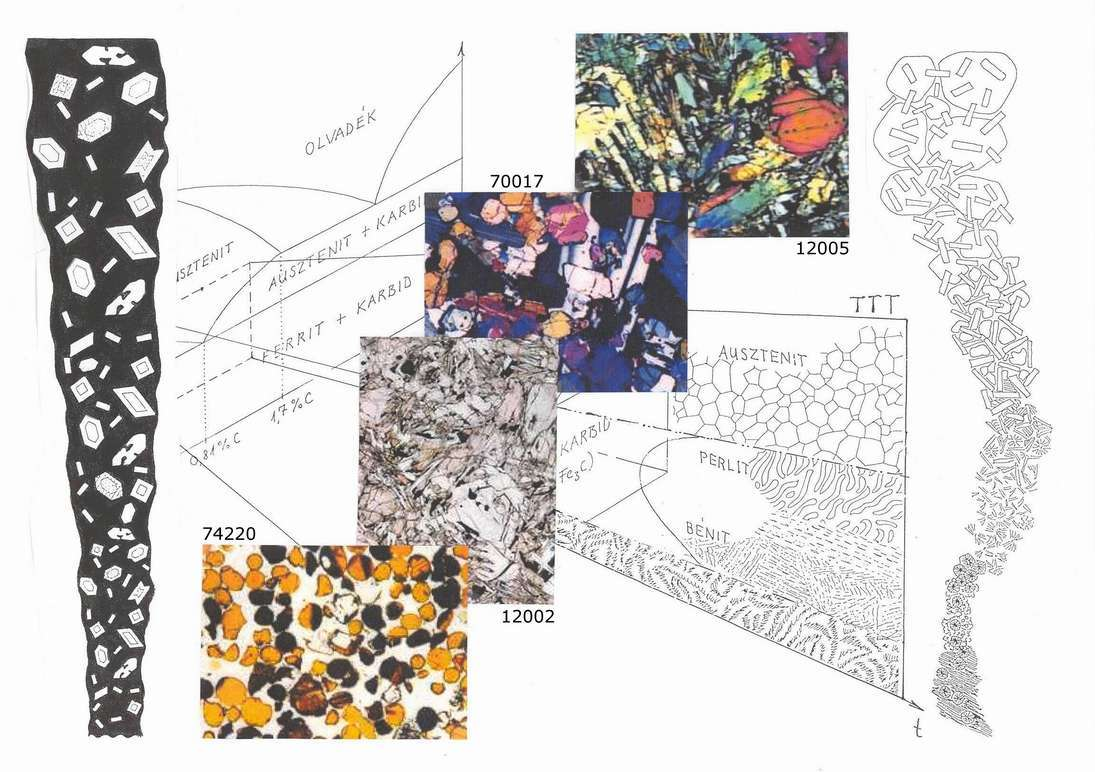 NASA készletbeli holdi bazaltok lehűlés szerinti sorba rendezve és összevetve a földi acélok edzési szövetdiagramjával